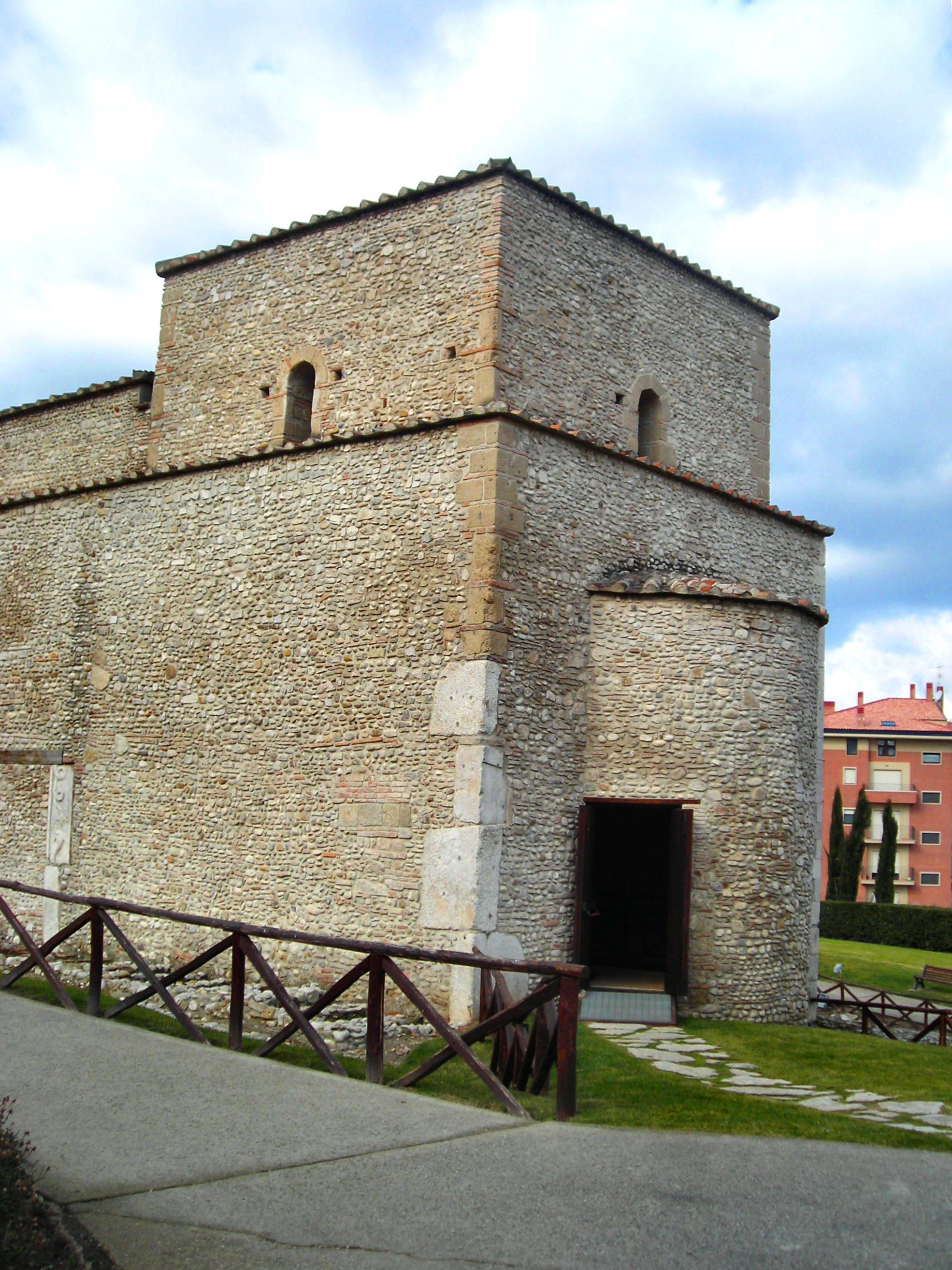 Abside dell'ex chiesa di sant'Ilario a Port'Aurea, Benevento